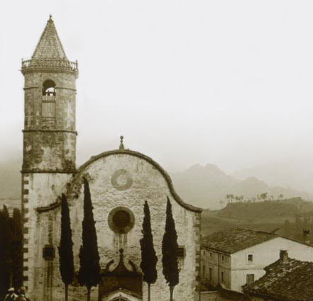 Sant Hilari de Vidrà. Rafael Degollada i Castanys (Entre 1912 i 1924)